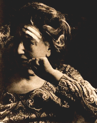 Fotografía de la escritoria y poetisa uruguaya Juana de Ibarbourou.